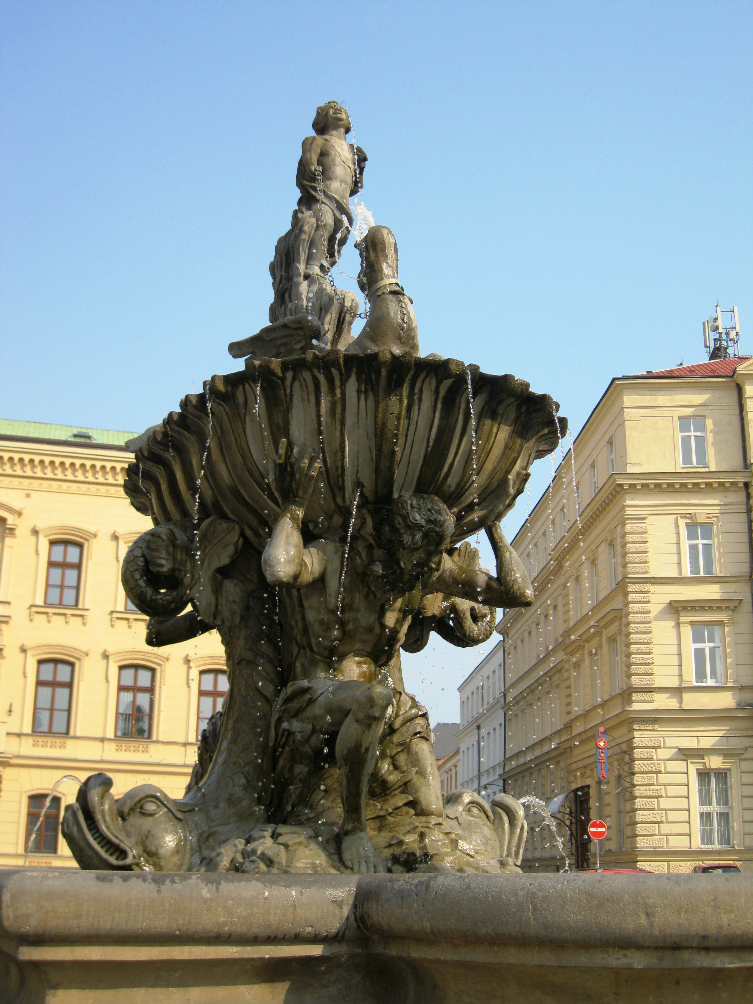 Kašna Tritonů (Olomouc)